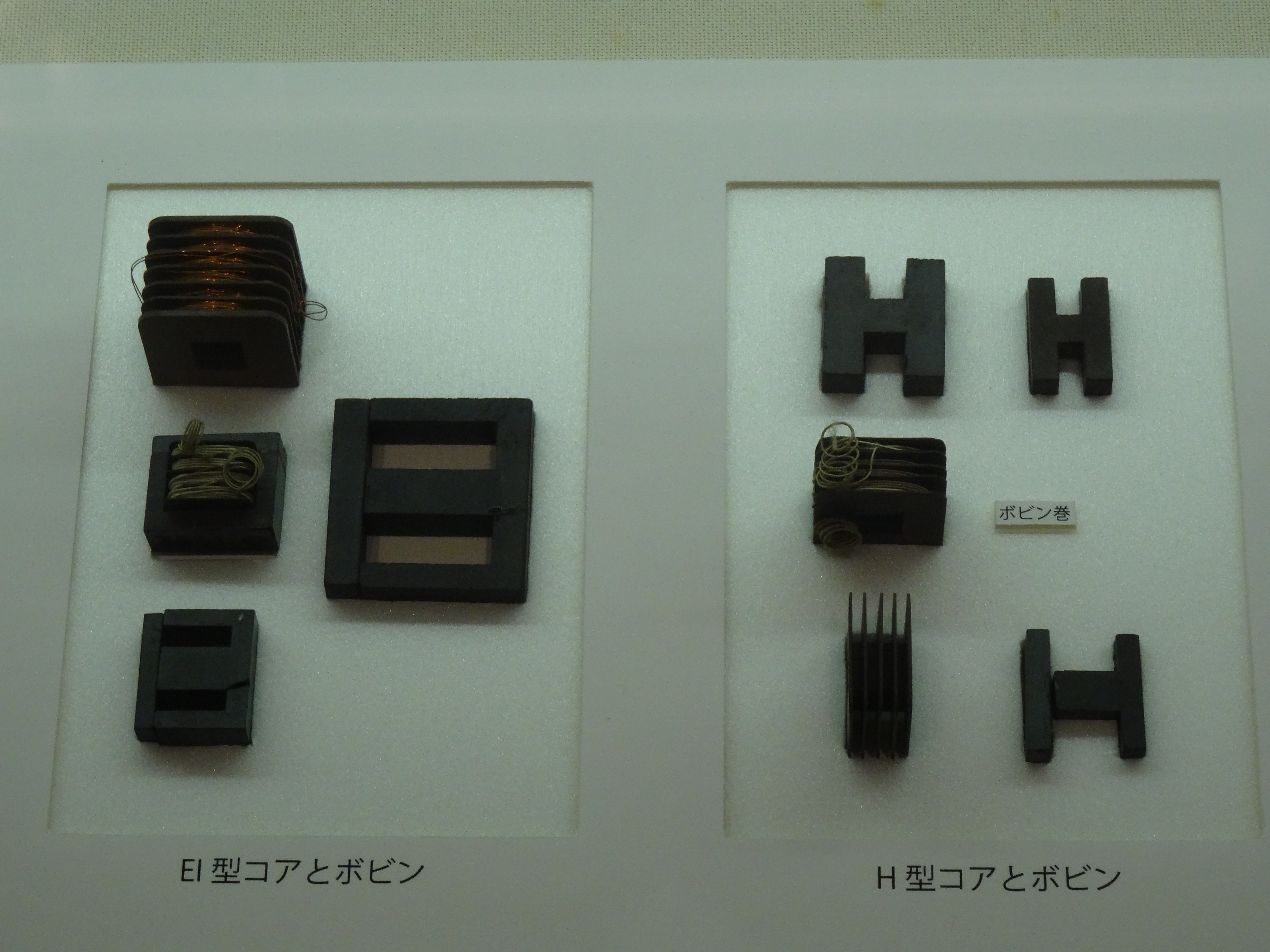 武井武が保管していたとされる初期のja:フェライトサンプル。東京工業大学博物館所蔵。